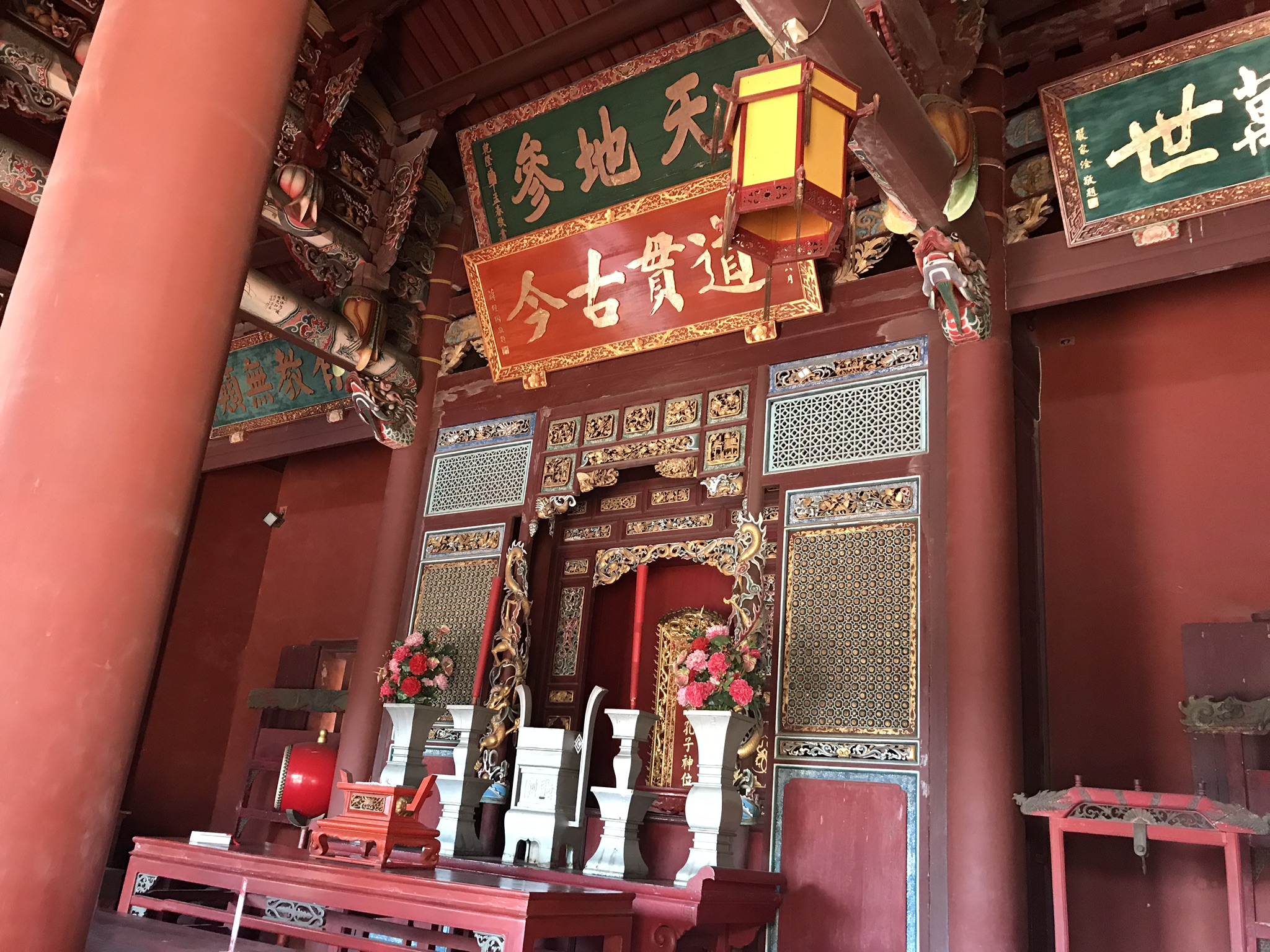 中文（台灣）: 彰化孔子廟大成殿內匾額